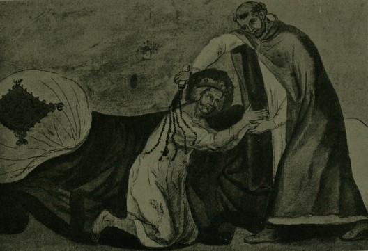 Louis